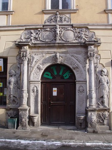 Jawor, ul. Legnicka 3 - portal domu 1600, XX w. (zabytek nr rejestr. A/2944/1390 z 7.09.1965)